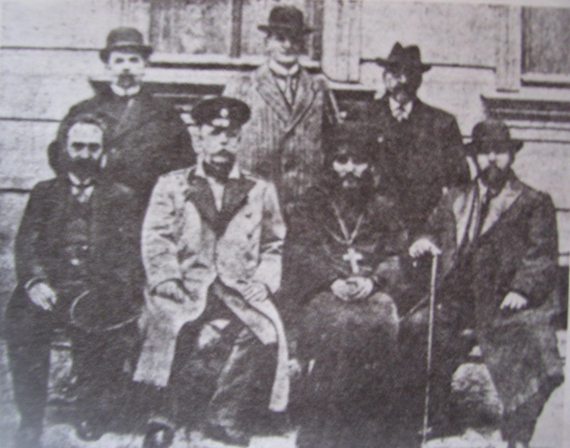 Представители на славянските народи в Санкт Петербург, сред които Димитър Чуповски, Георги Георгов и Наце Димов